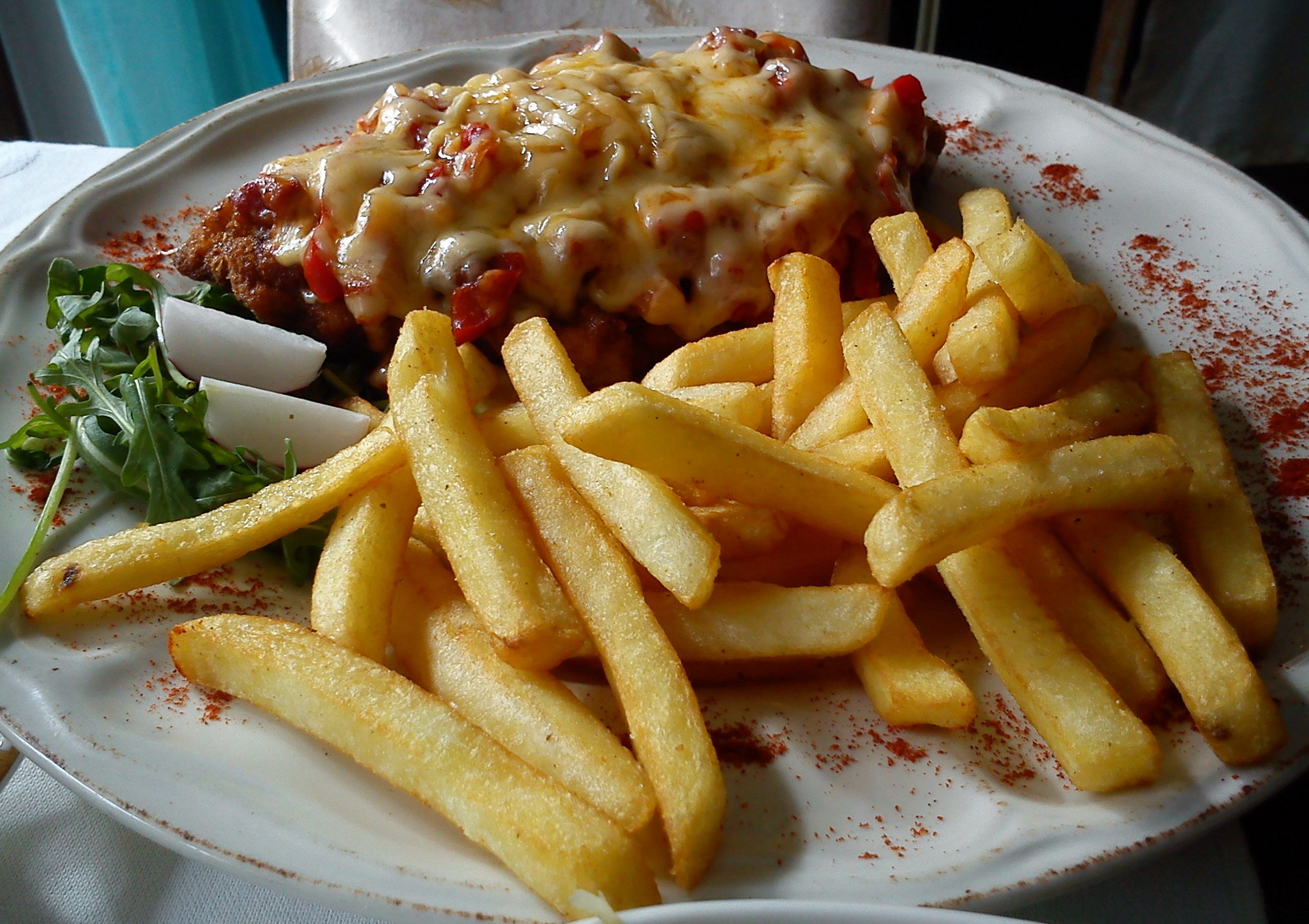 Frytki, kotlet cygański i rukola. Gościniec U Michała, Drzymałowo.